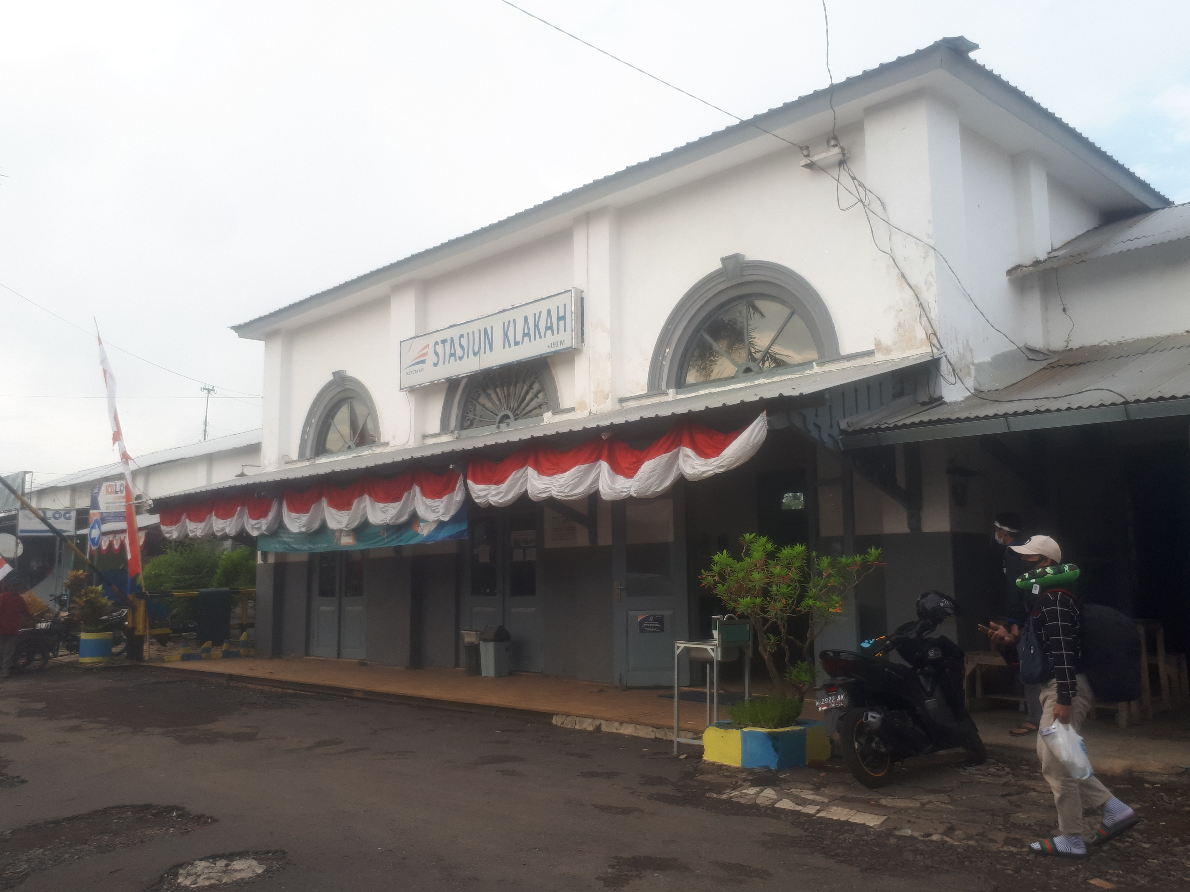 Tampak depan Stasiun Klakah, 2020